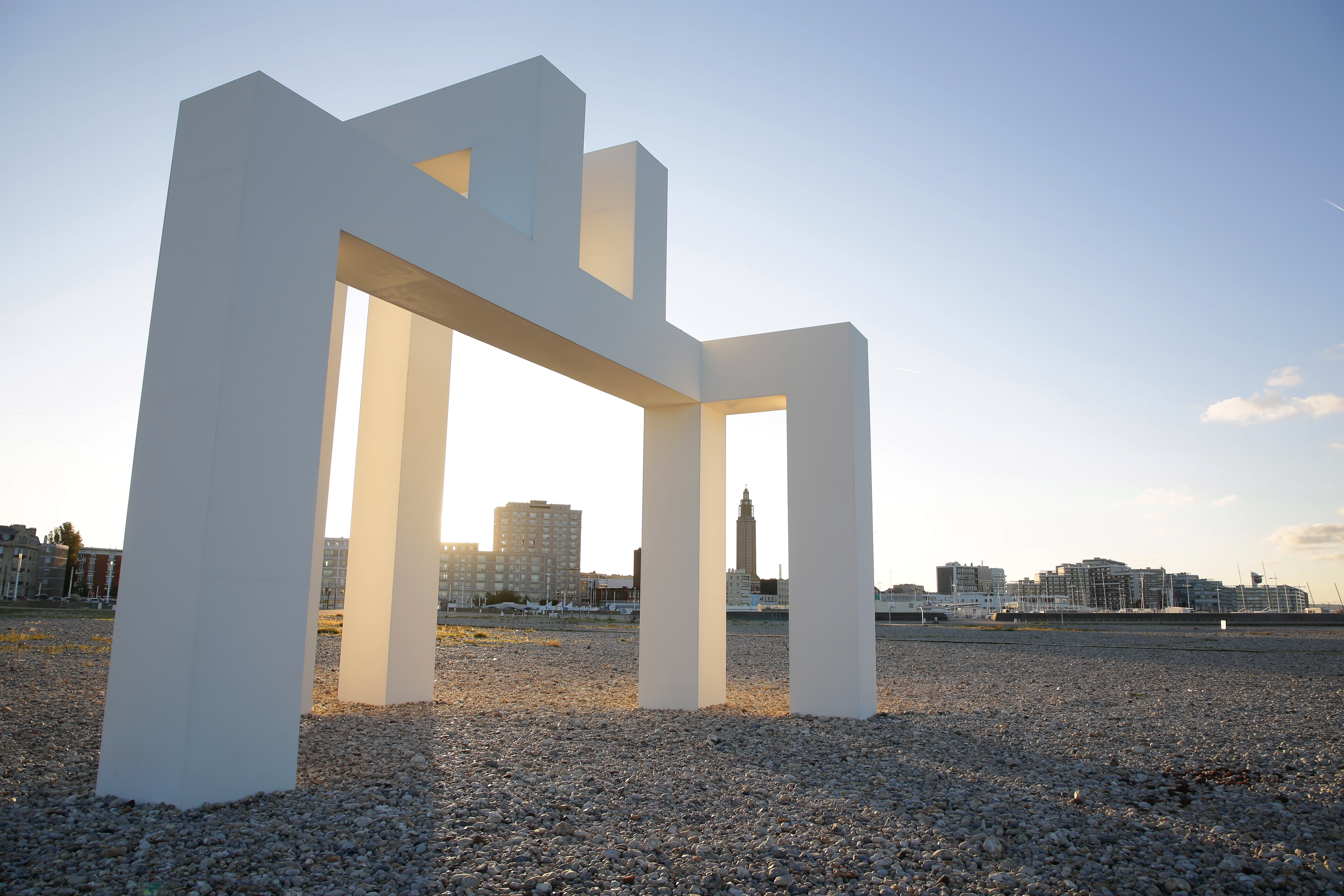 UP #3 Le Havre, une oeuvre de Sabina Lang et Daniel Baumann pour Un Eté au Havre.